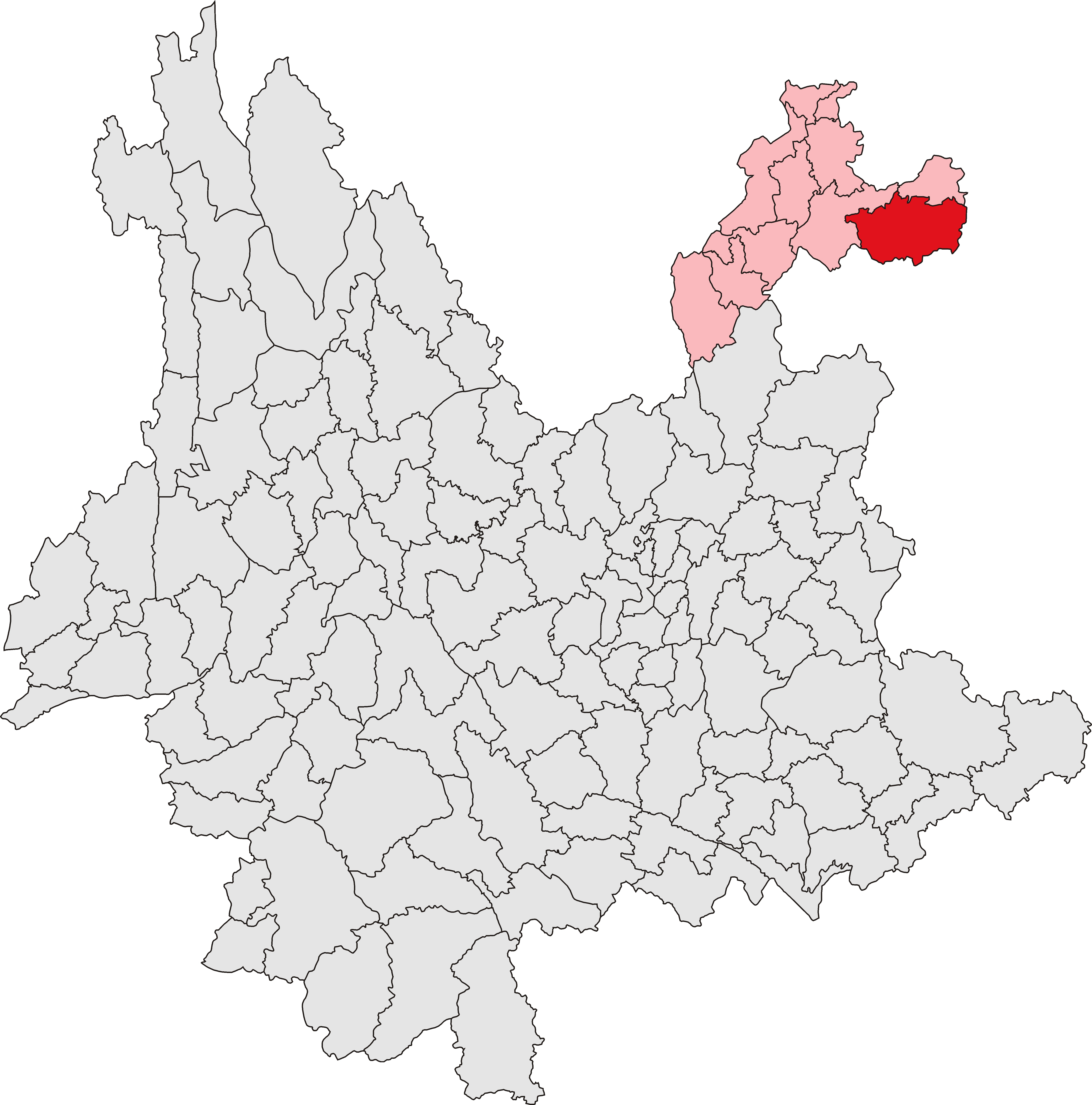 镇雄县位置图